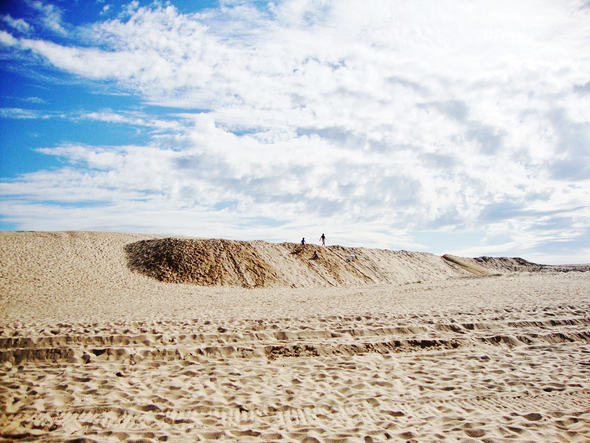 Sesimbra. This is a photography of a Site of Community Importance in Portugal with the ID: PTCON0054. Natura2000 entry, EEA entry